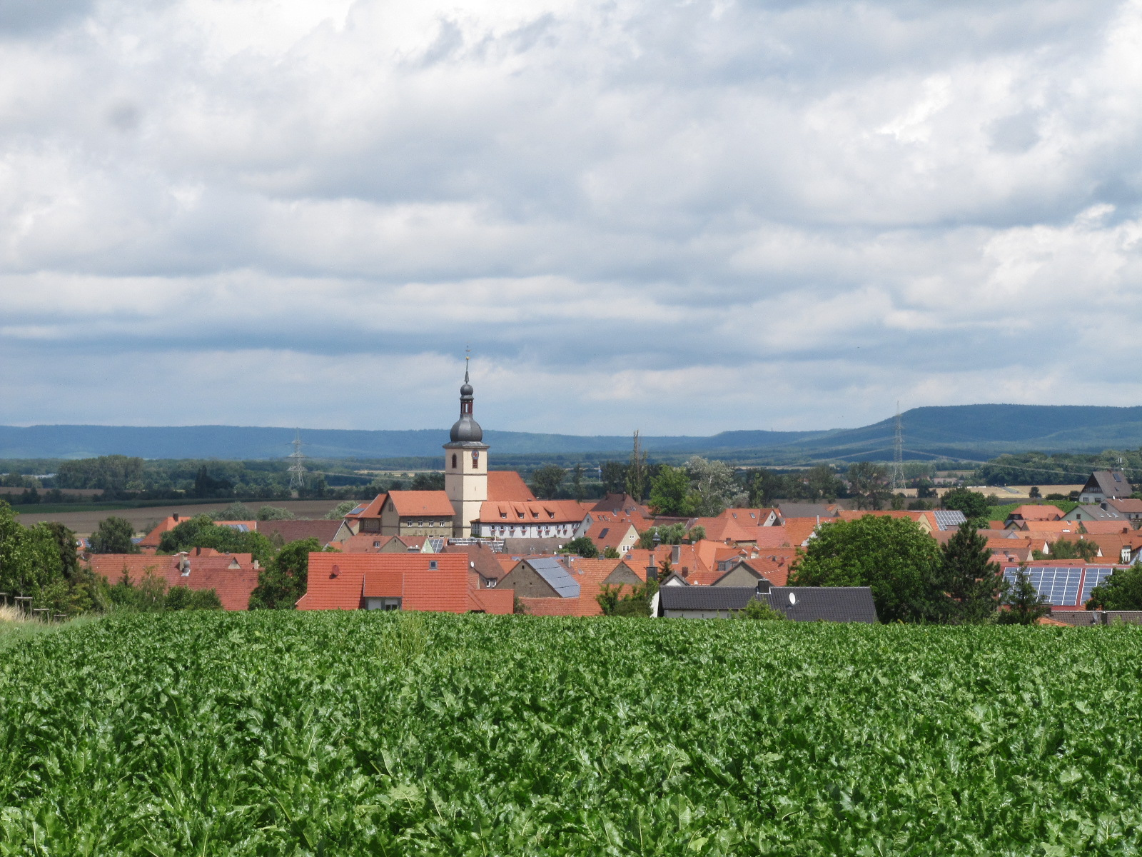 Von Rödelsee kommend ist die zum Teil in einem Wohnhaus erhalten gebliebene Kirchenburganlage deutlich erkennbar.